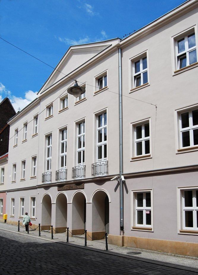 Świeżo wyremontowana fasada Raciborskie Centrum Kultury przy ulicy Chopina.